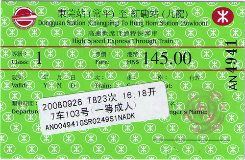 九廣直通車車票 2008年9月26日 T823次 東莞站（常平）往紅磡站（九龍）